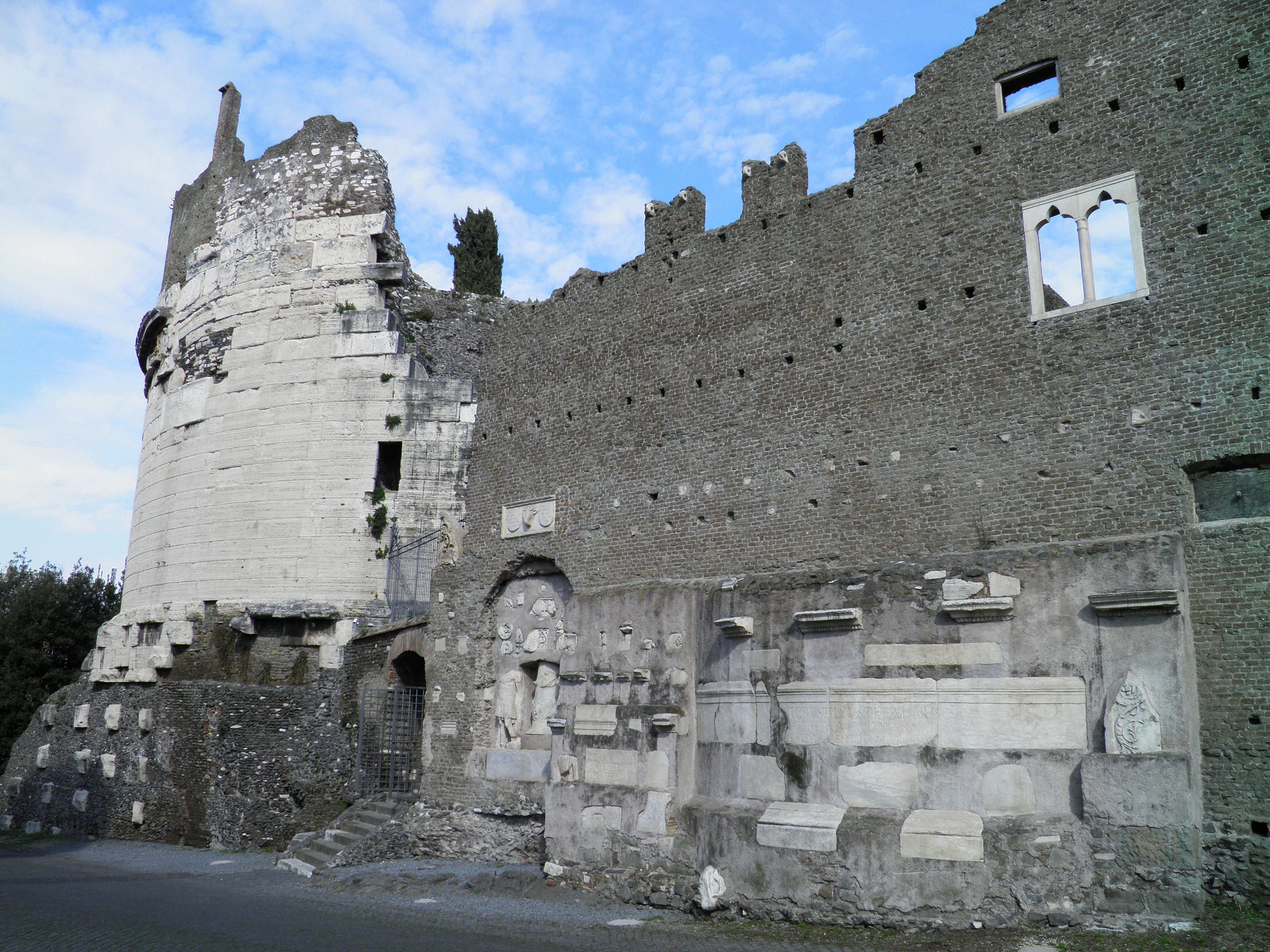 Mausoleum of Caecilia Metella, Via Appia